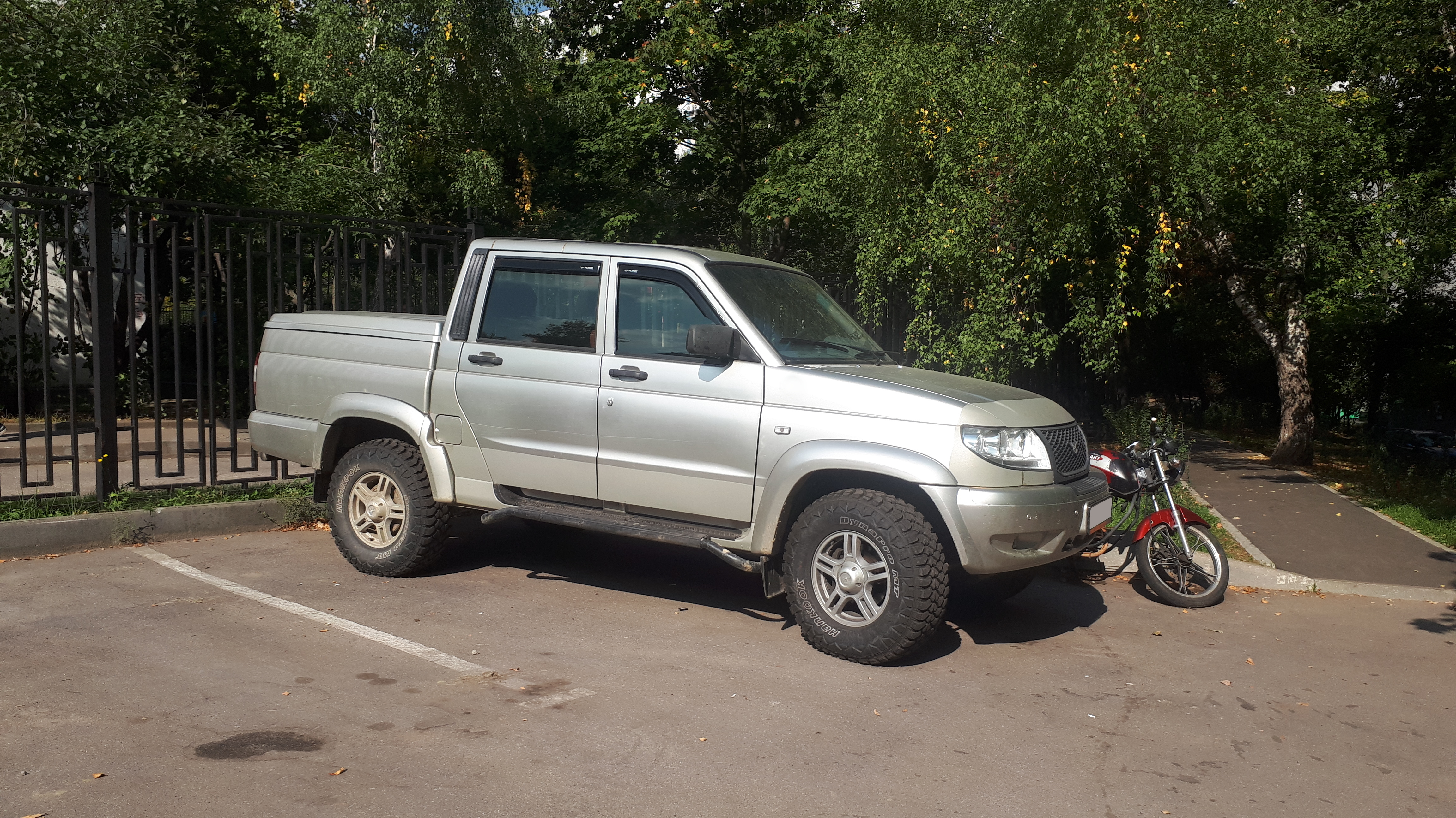 УАЗ Пикап.